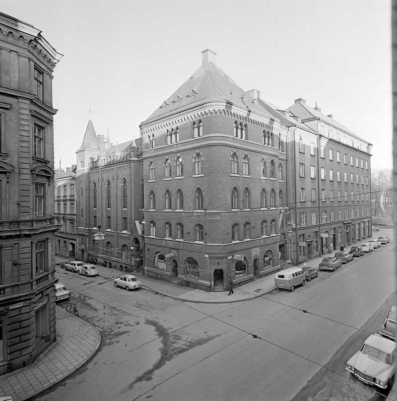 Tabernaklet, Stockholm. Byggnadsår 1890-94. Arkitekter Kasper Salin och Gustaf Lindgren